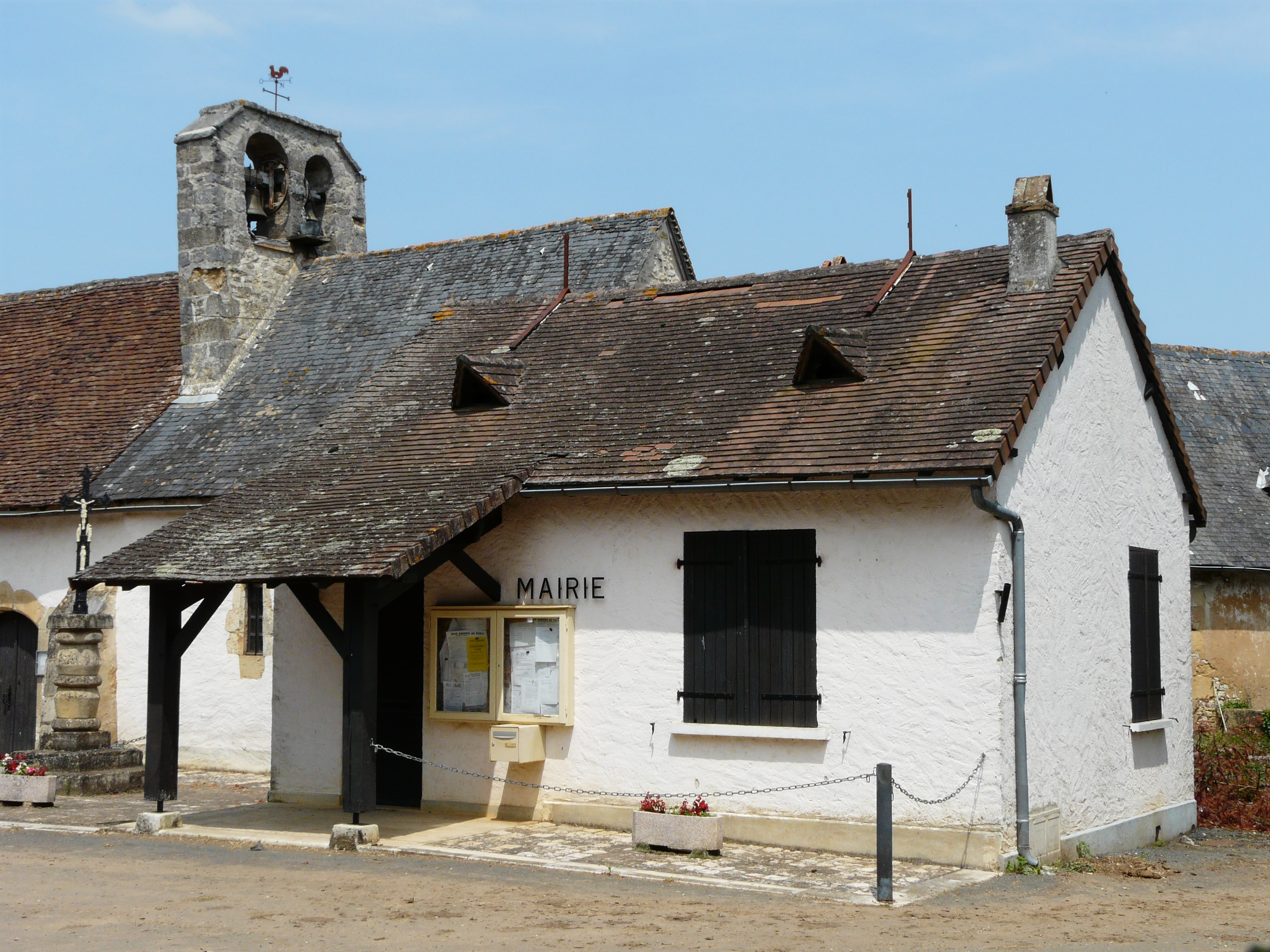 La mairie de Temple-Laguyon, Dordogne, France.